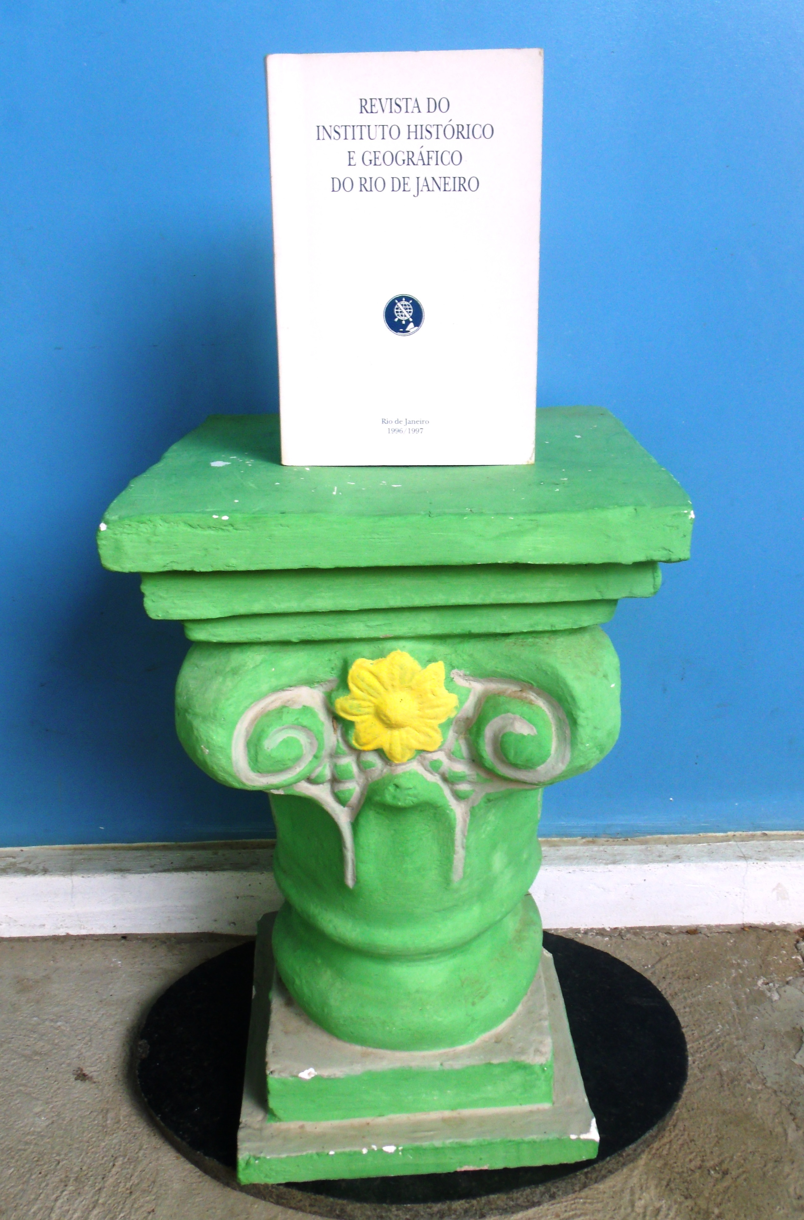 Coluna de arquitetura clássica encimada pela Instituto Histórico e Geográfico do Rio de Janeiro.